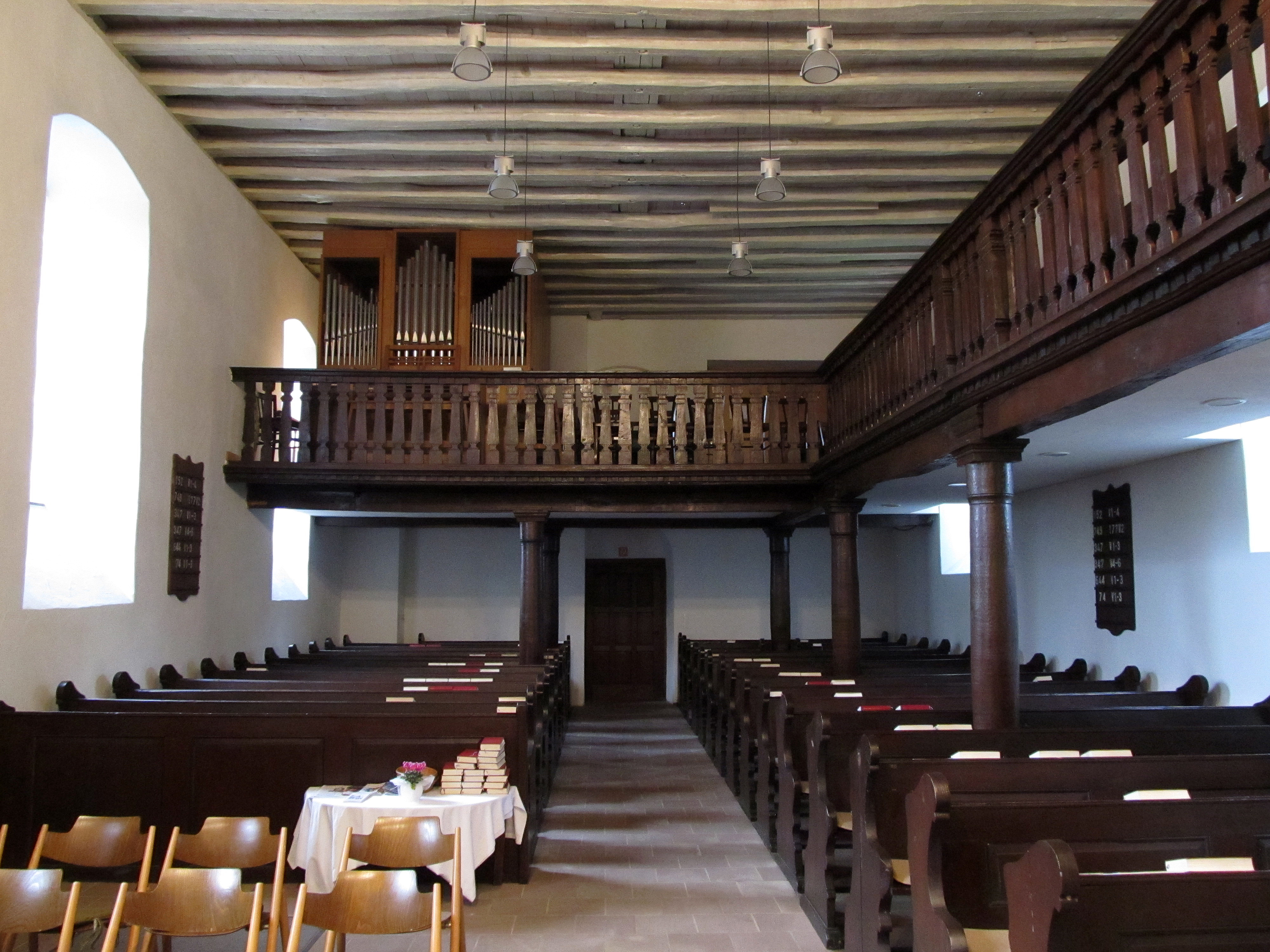 Blick ins Innere der protestantischen Elisabethkirche in Limbach, Gemeinde Kirkel, Saarland